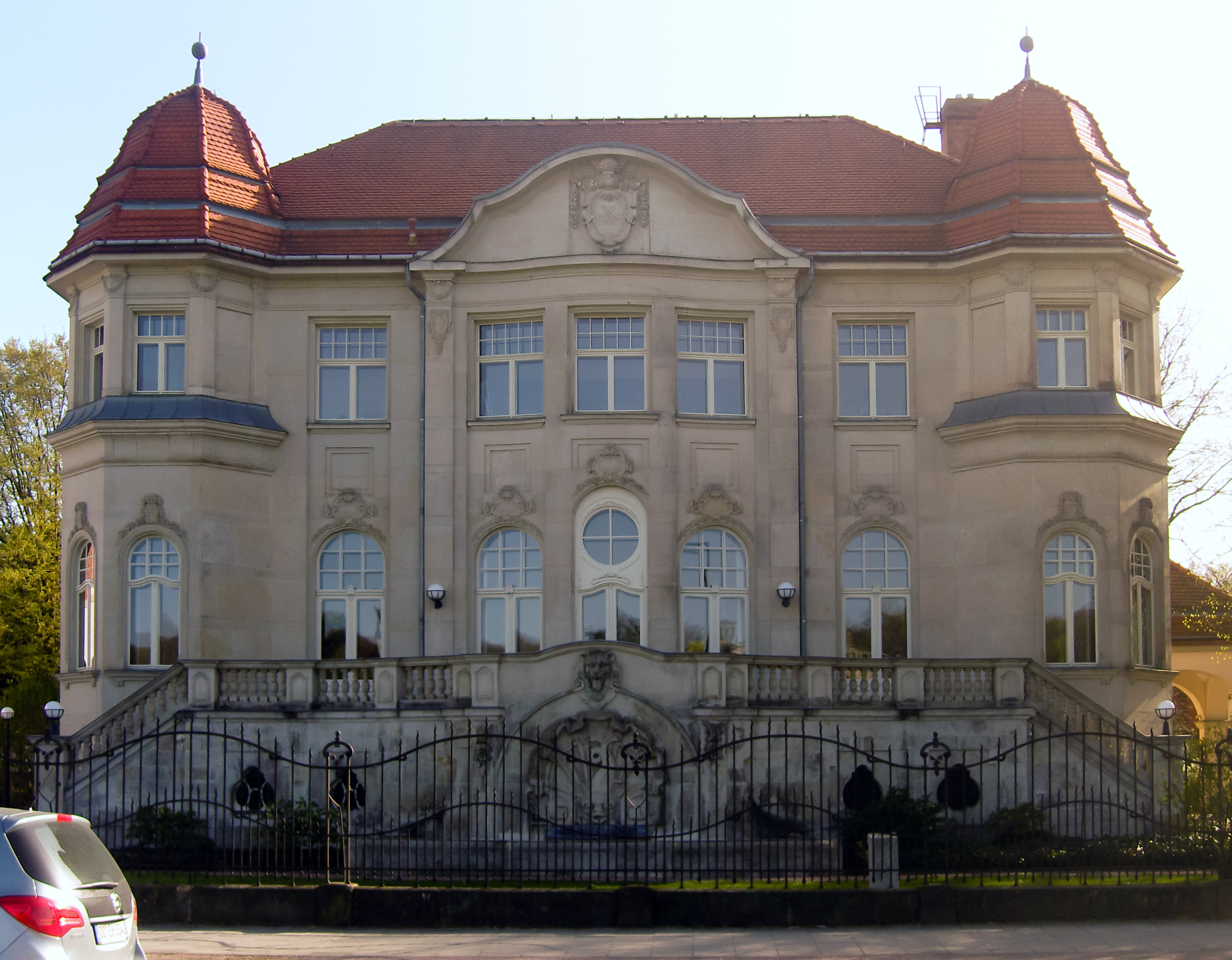 Denkmalgeschützte Villa mit Hintergebäude, Teehaus und Einfriedung (Käthe-Kollwitz-Ufer 88) in Dresden